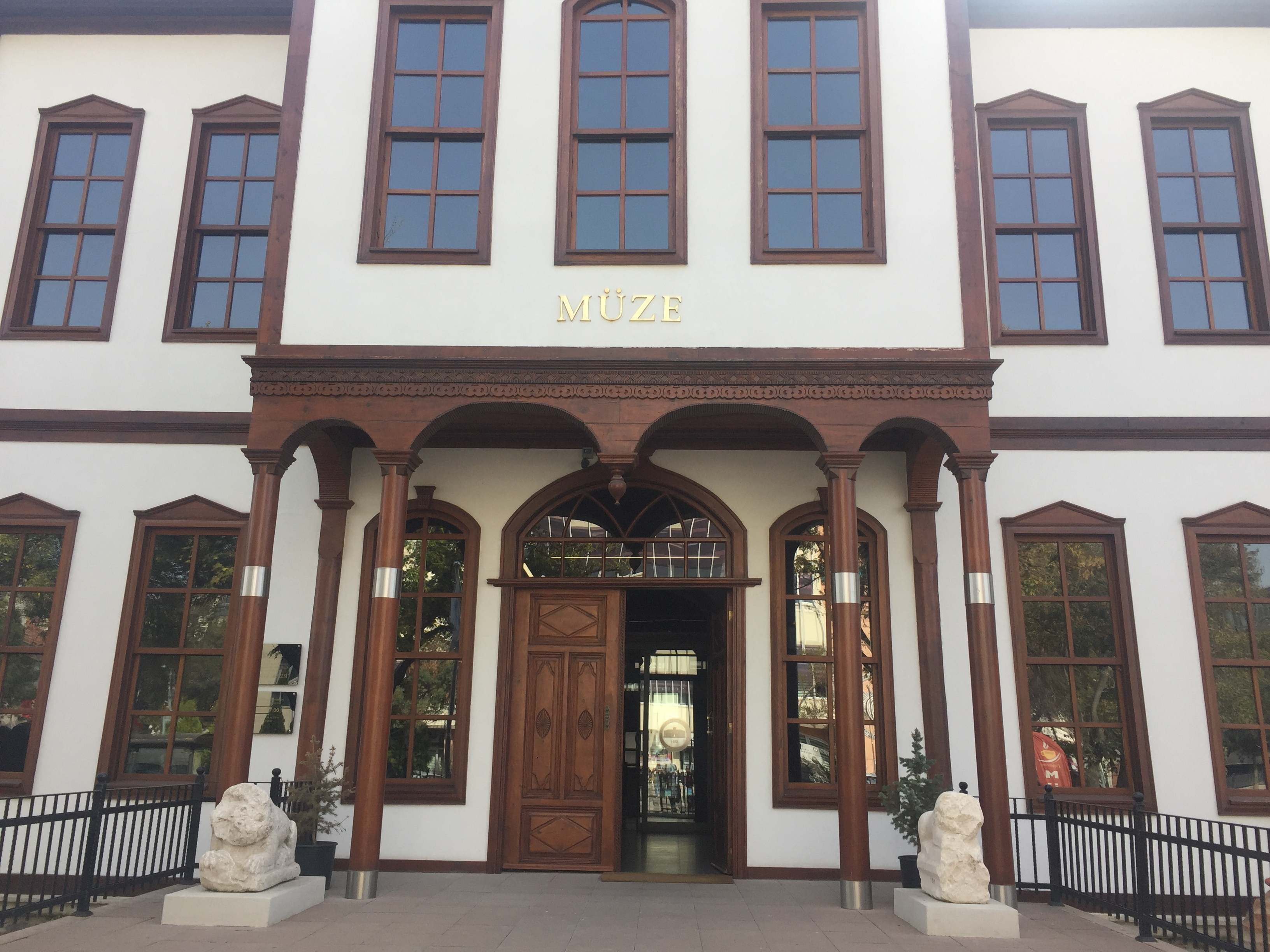 Çankırı Müzesinden bir görünüm.